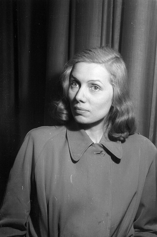 Original image description from the Deutsche FotothekSzenenbilder